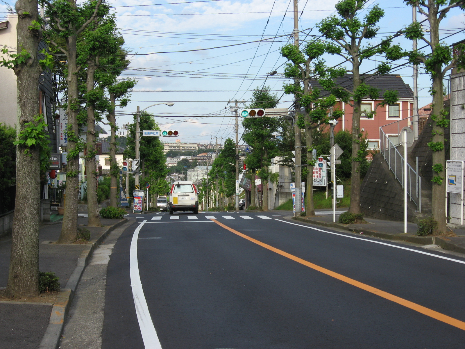 医薬神社前交差点